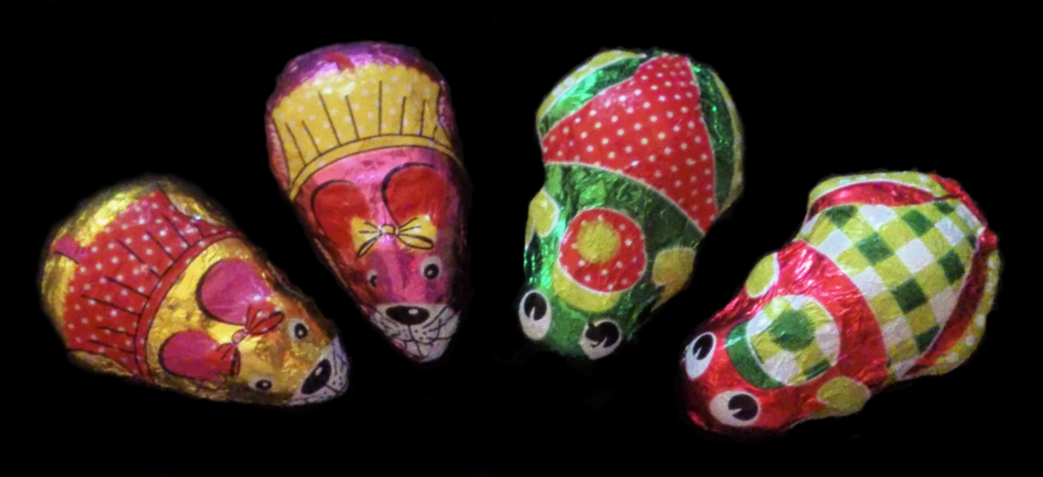 Fondantsnoep, overtrokken met chocolade en gewikkeld in bedrukt zilverpapier met afbeeldingen van kikkers en muizen in badpak, gerelateerd aan het St.Nicolaasfeest.